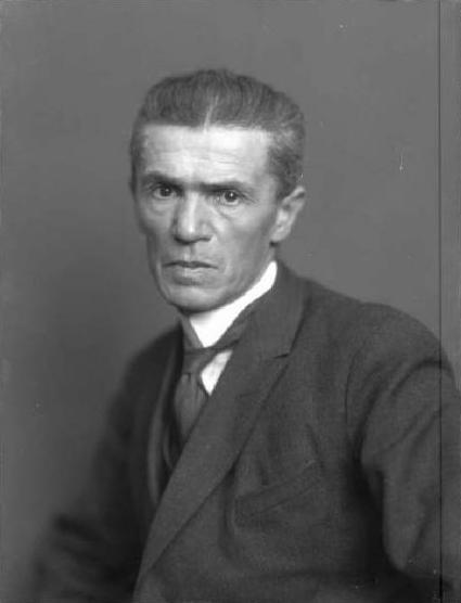 Ritratto dello scultore Adolfo Wildt, opera del fotografo Emilio Sommariva (1923)